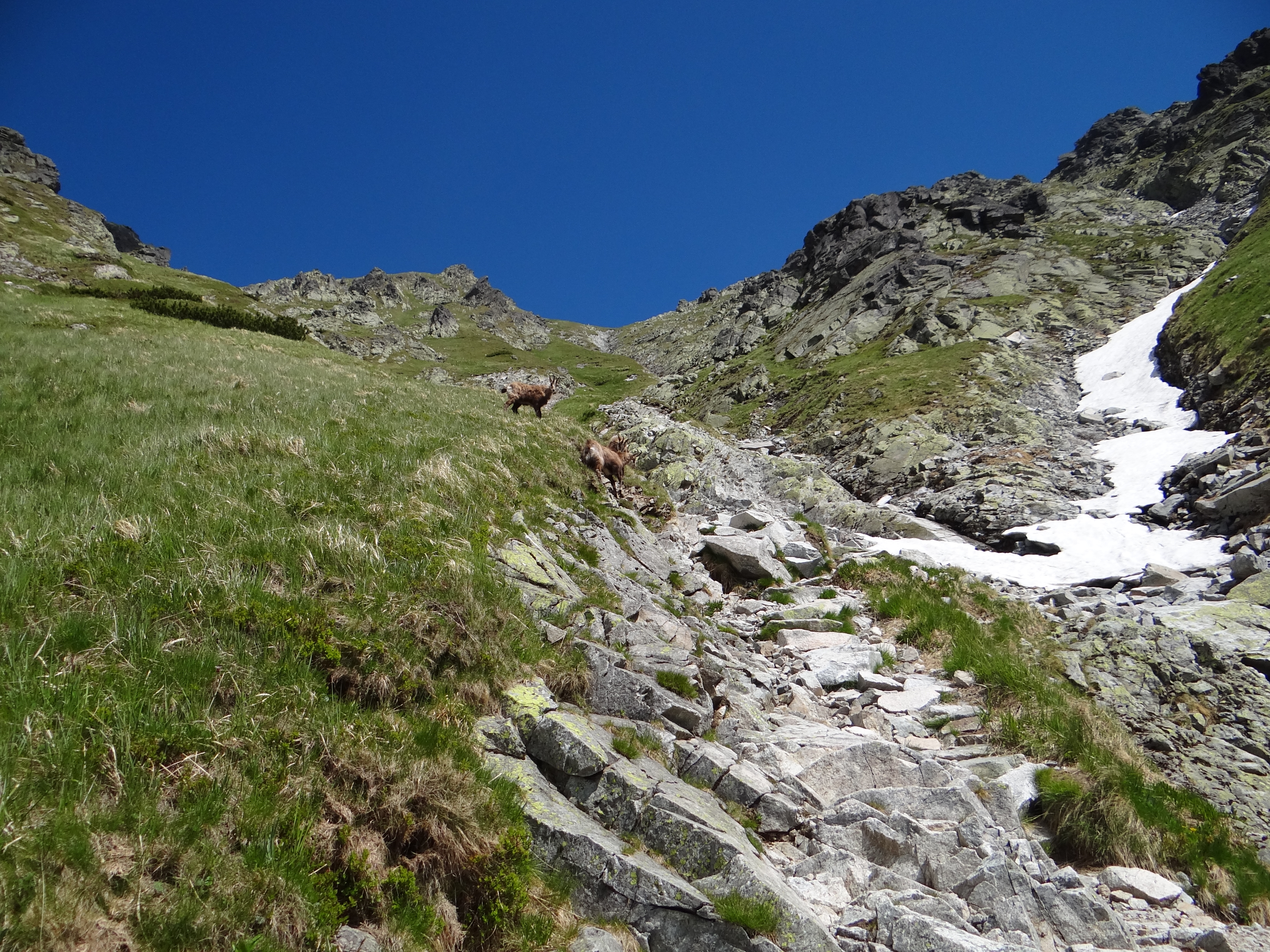 Żleb pod Krzyznem